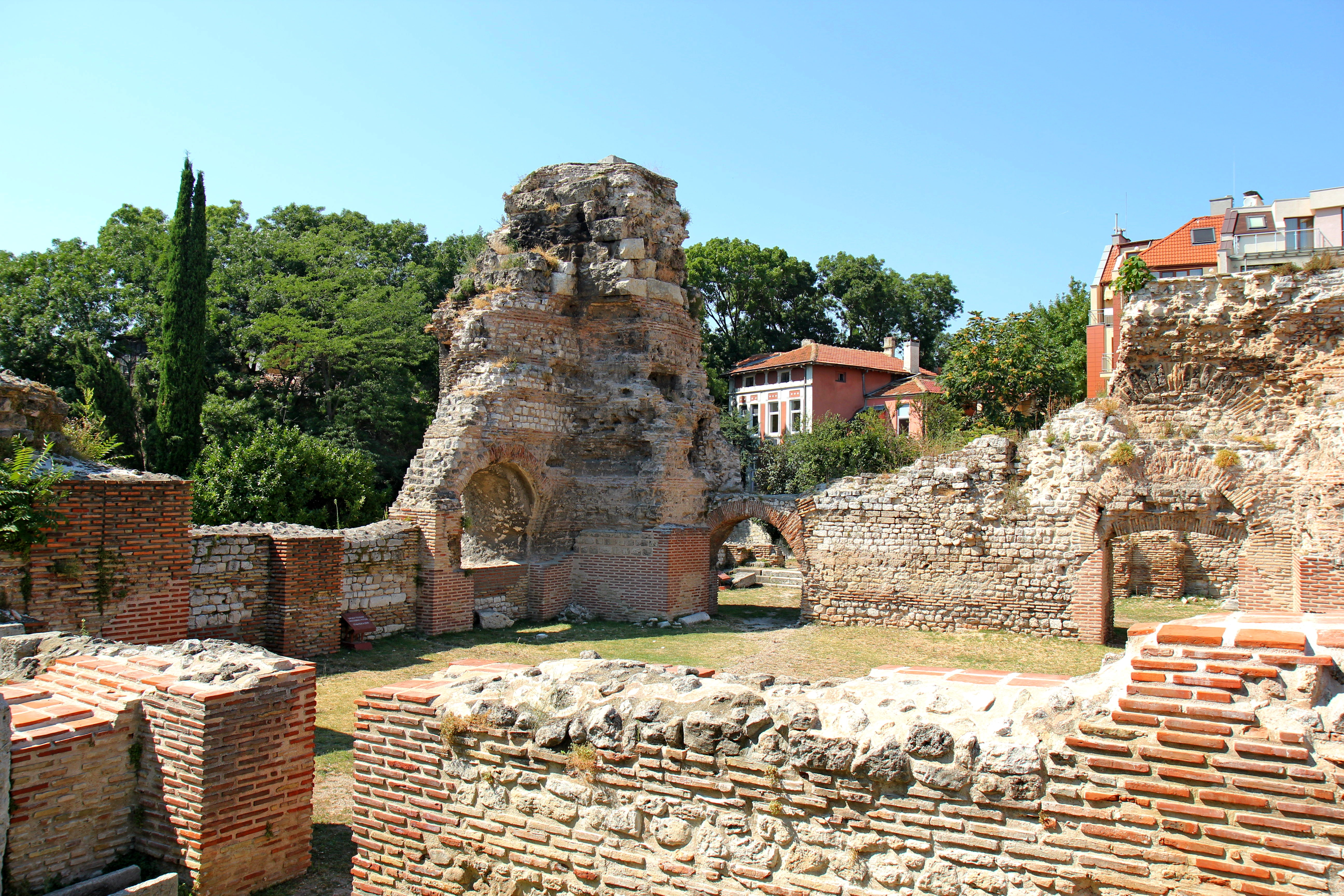 Антична сграда Римски терми